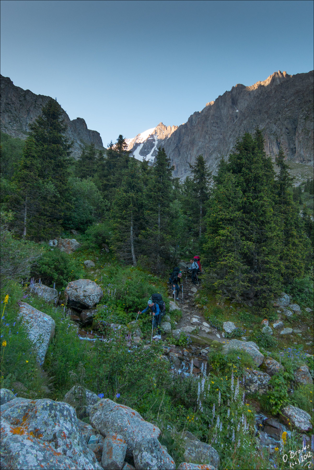 Горный поход 6 к/с группы турклуба МГУ по центральному Тянь-Шаню, июль-август 2012 Часть I: Заезд, паковка, а/л Ала-Арча